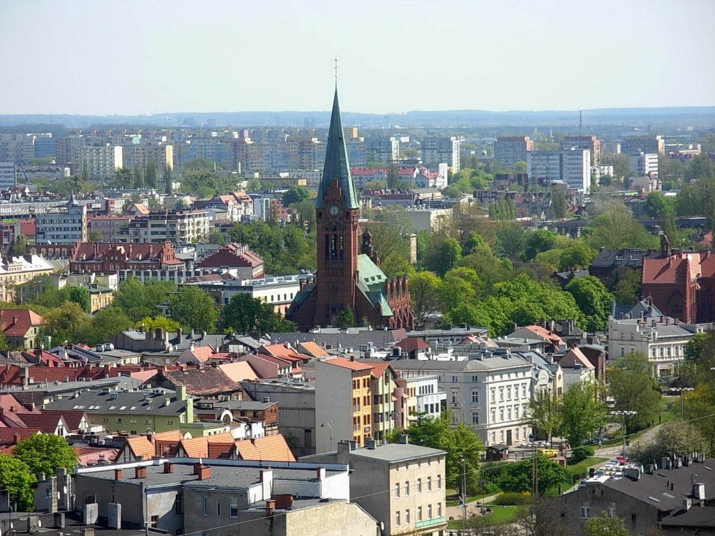 Kościół św. Andrzeja Boboli (Jezuicki) w Bydgoszczy, zbud. 1903 r., do 1945 r. fara ewangelicka